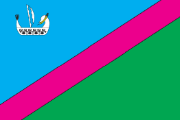 Прапор Великоновоселківського району